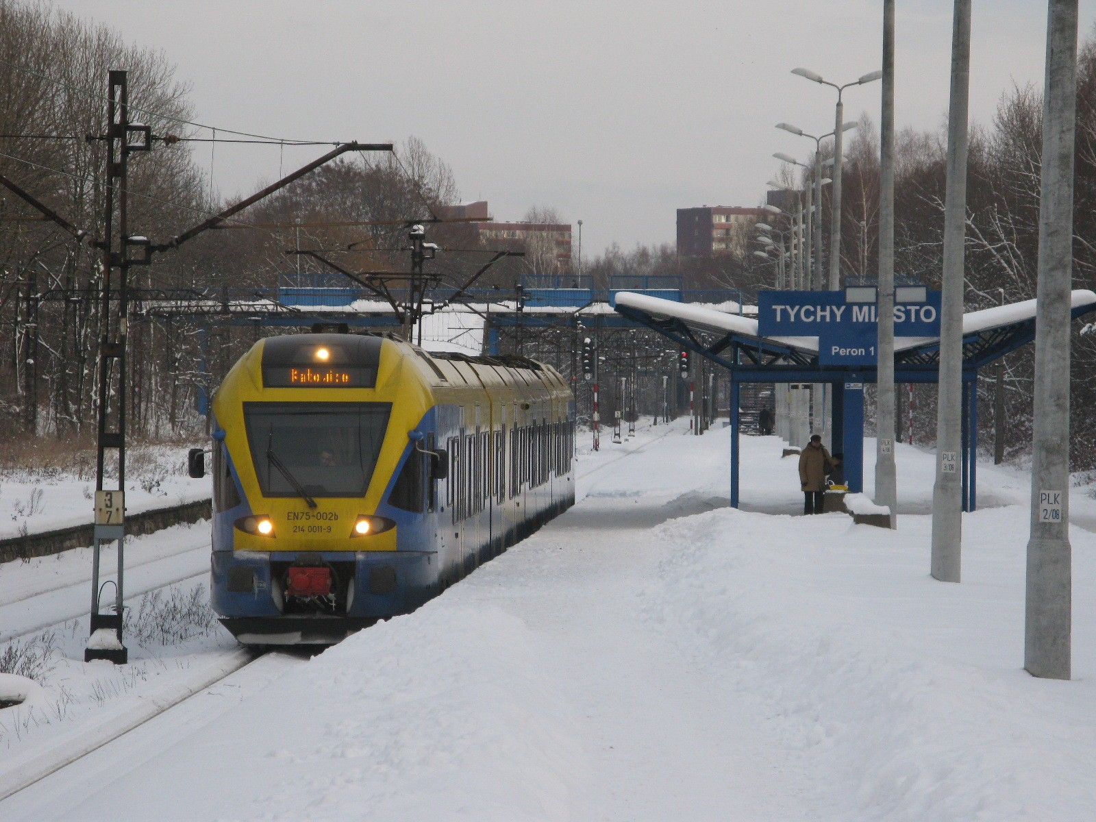 EN75